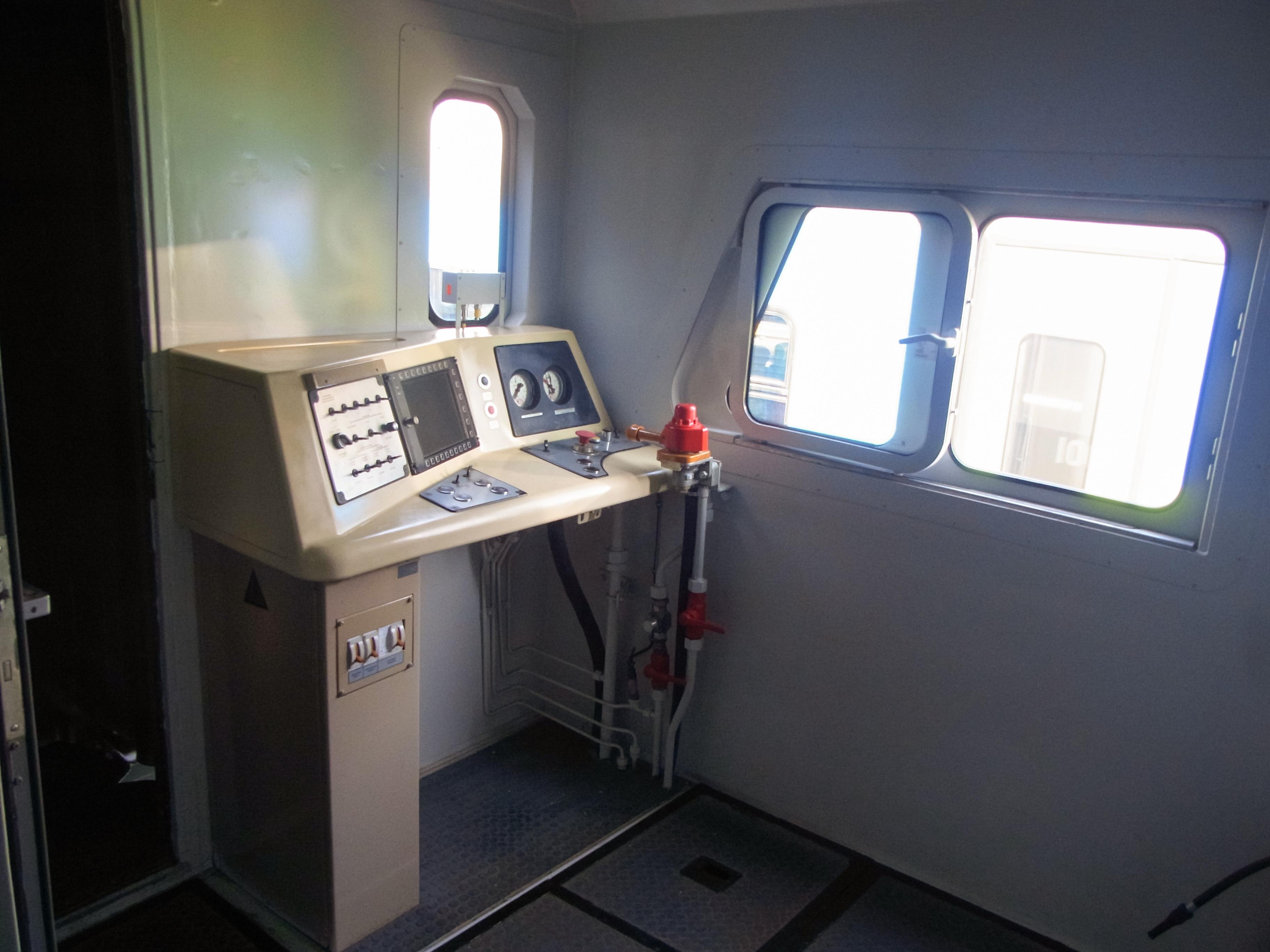 Промежуточная кабина машиниста тепловоза 3ТЭ25К2М-0001